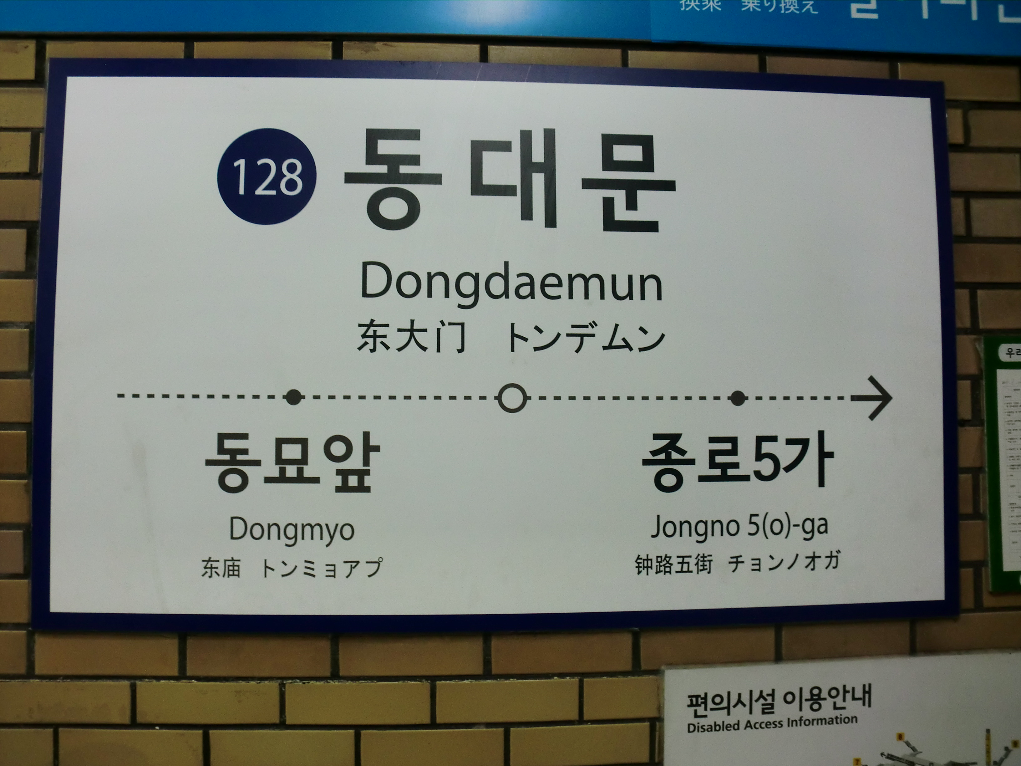 지하철1호선 동대문역역명판